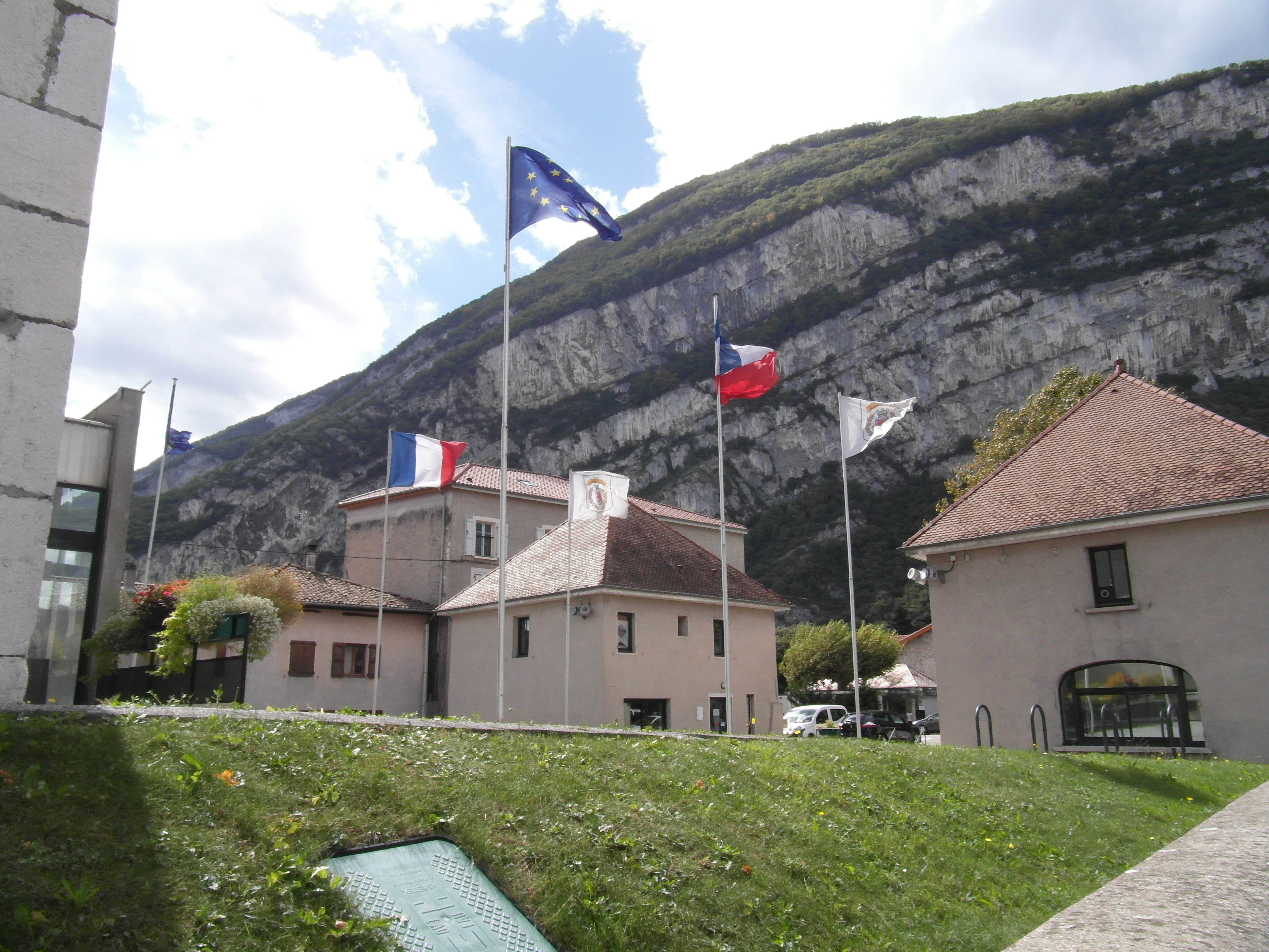 Esplanade de la mairie de sassennage